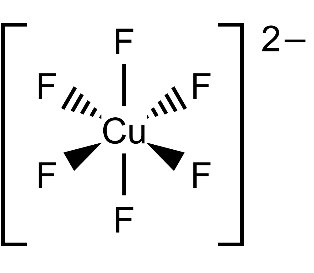 Strukturformel des Hexafluorocuprat(IV)-Anions.